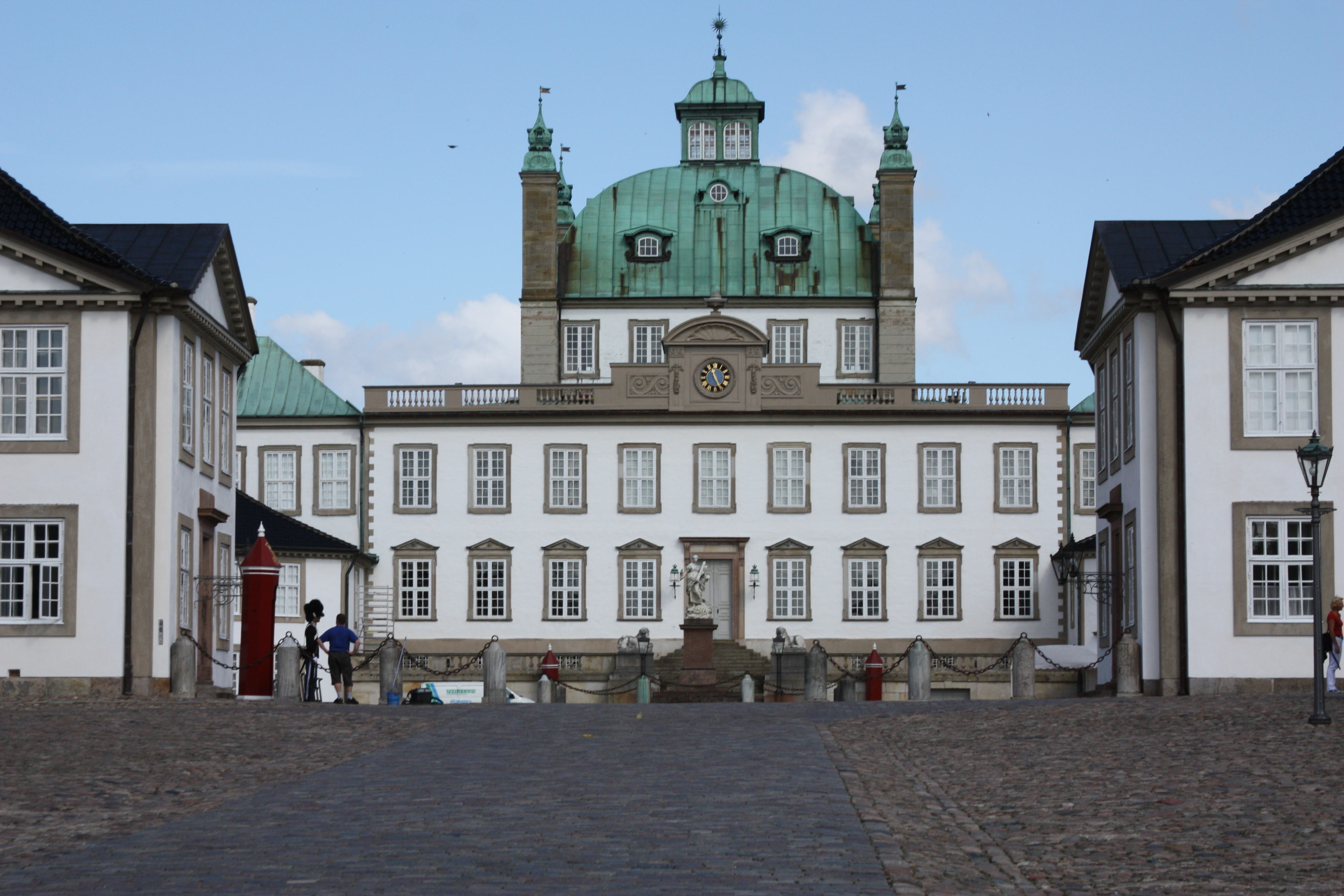 Fredensborg Slot, near Copenhagen, August 2009